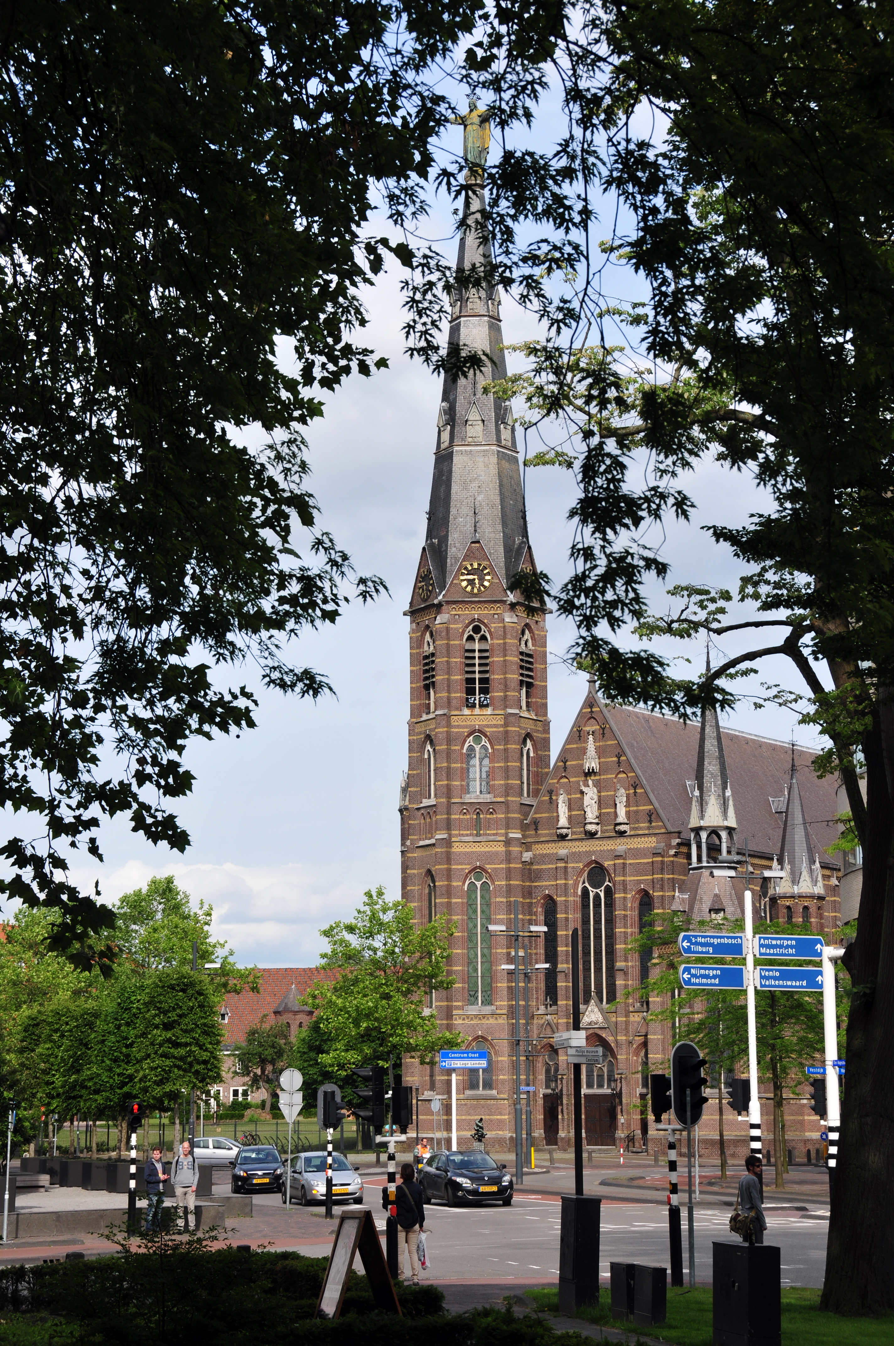 Eindhoven, Niederlande, 2013